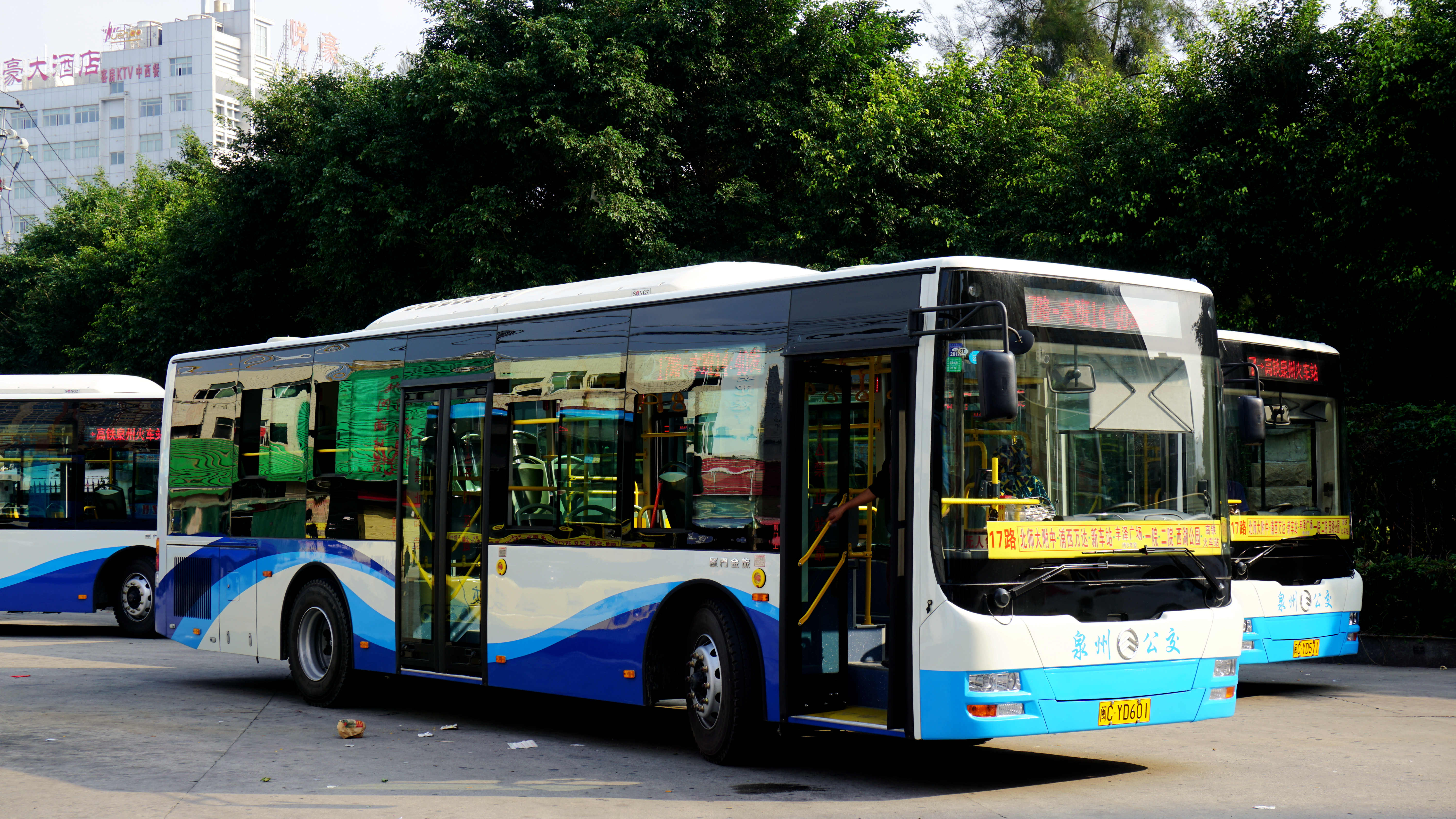 泉州公交17路，第二批XML6105JHEVE8C1(海飞丝涂装)